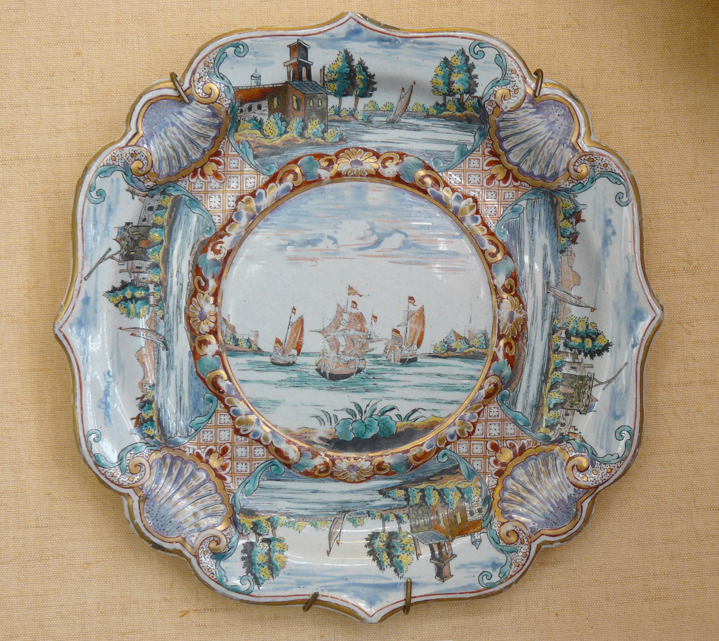 Assiette ou plat, Delft doré à décors floral, paysage et coquille, sujet central bateaux - XVIIIème siècle, diamètre environ 25 cm - Musée national de céramique (Sèvres, Hauts-de-Seine, France) Inv n° 14273